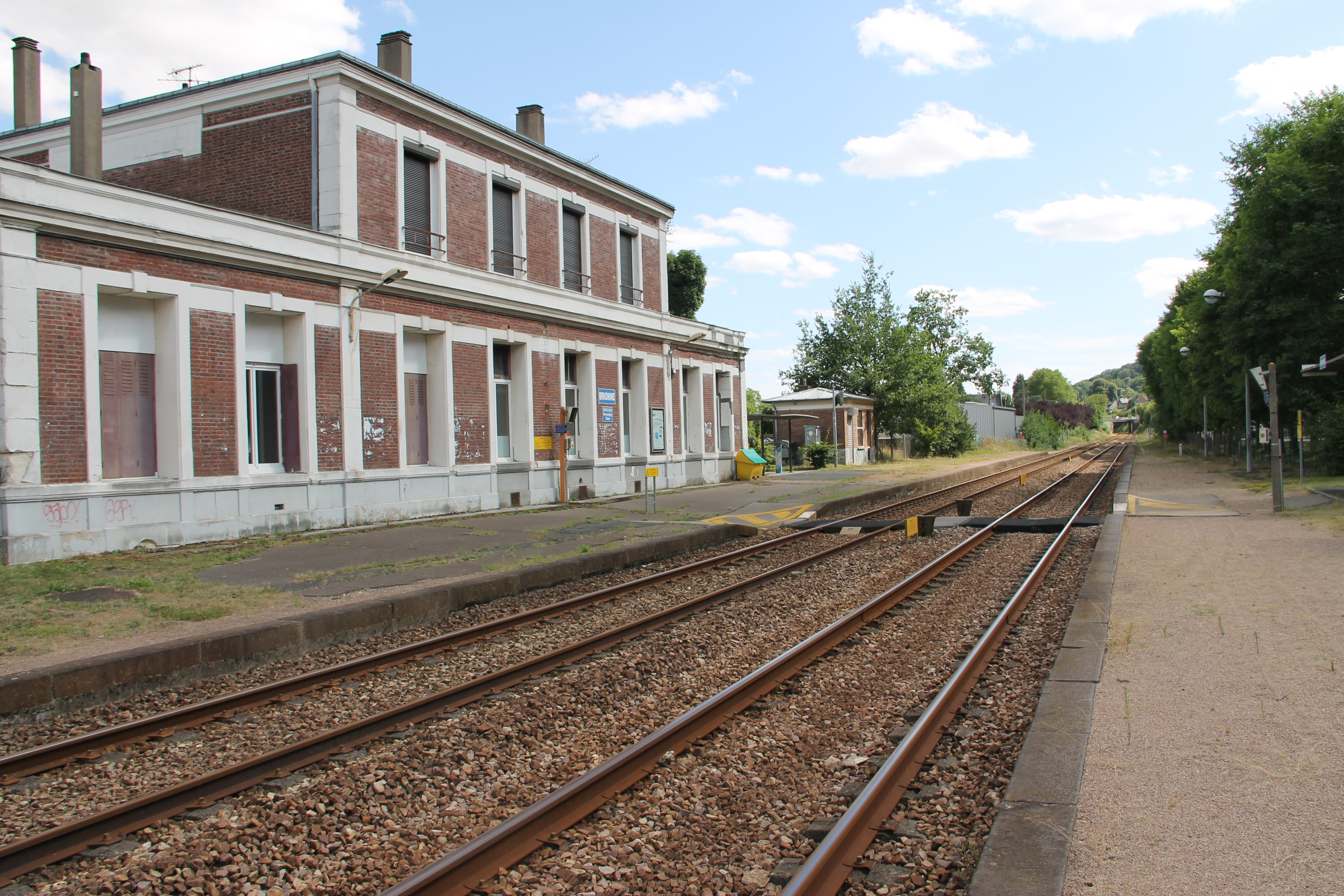 Ancien bâtiment voyageurs et quais de la gare de Brionne, département de l'Eure, France.